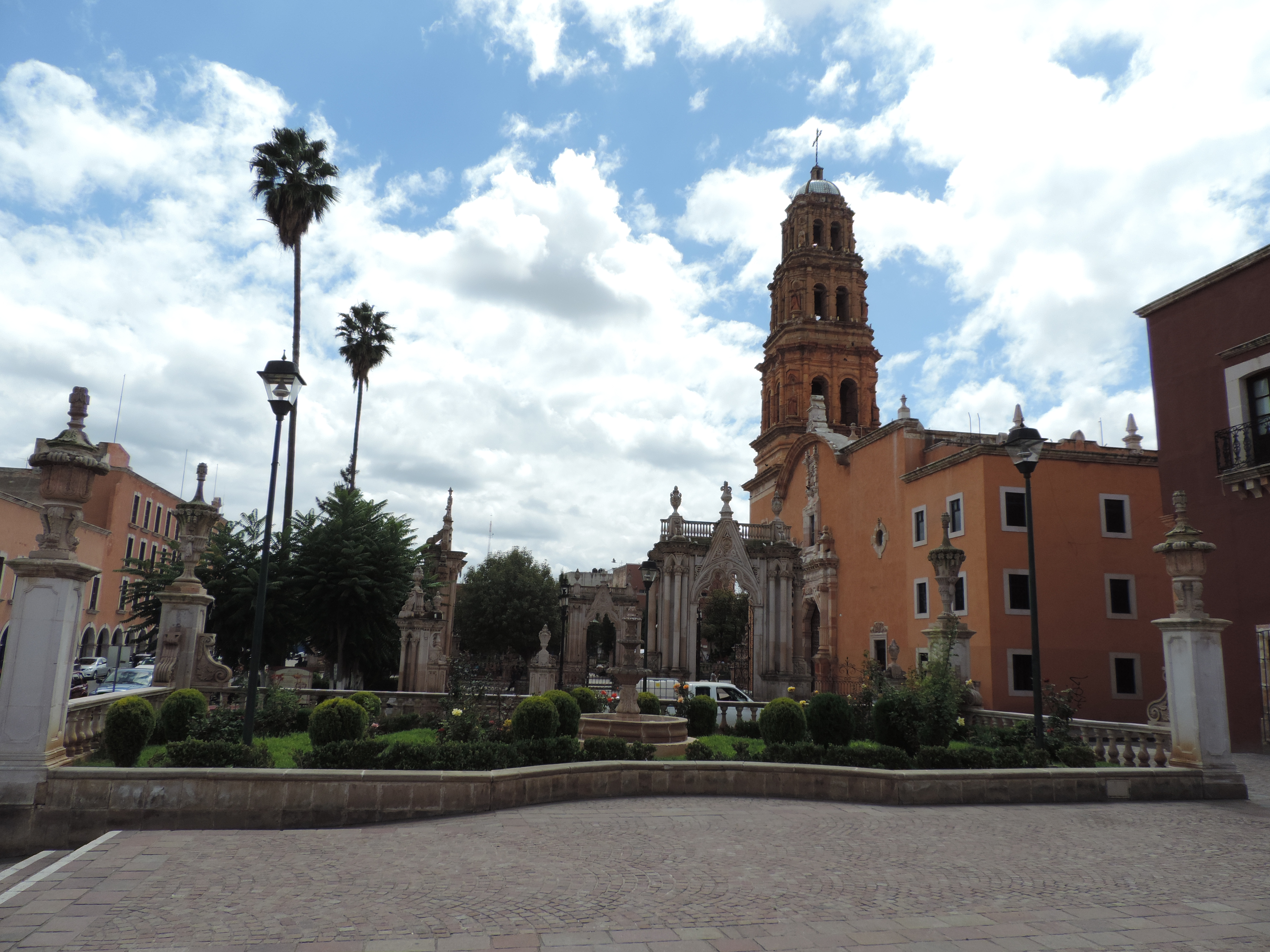 Templo de la Purificación